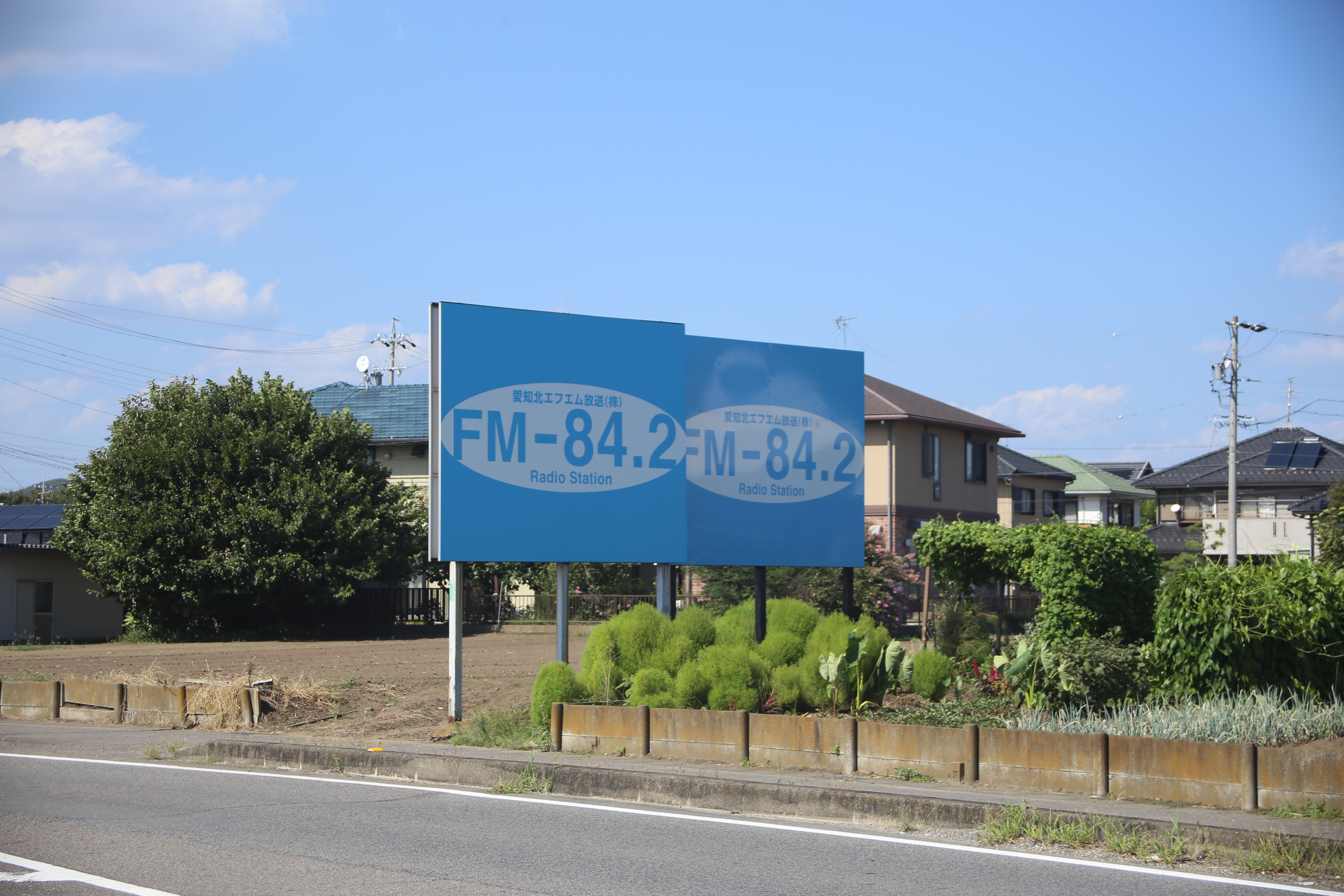 愛知県扶桑町に設置されている愛知北エフエム放送（FM84.2MHz）の看板